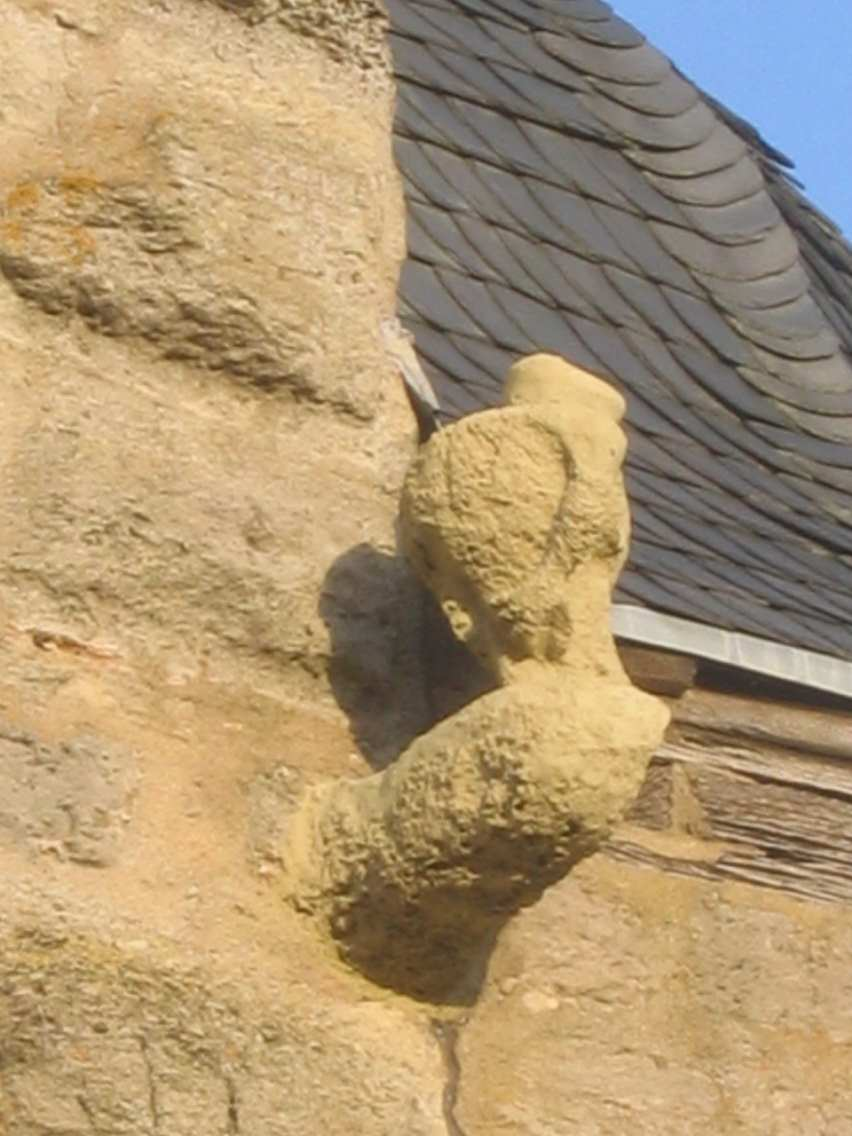 Fladungen / Rhön, Maulaffenturm: Maulaff